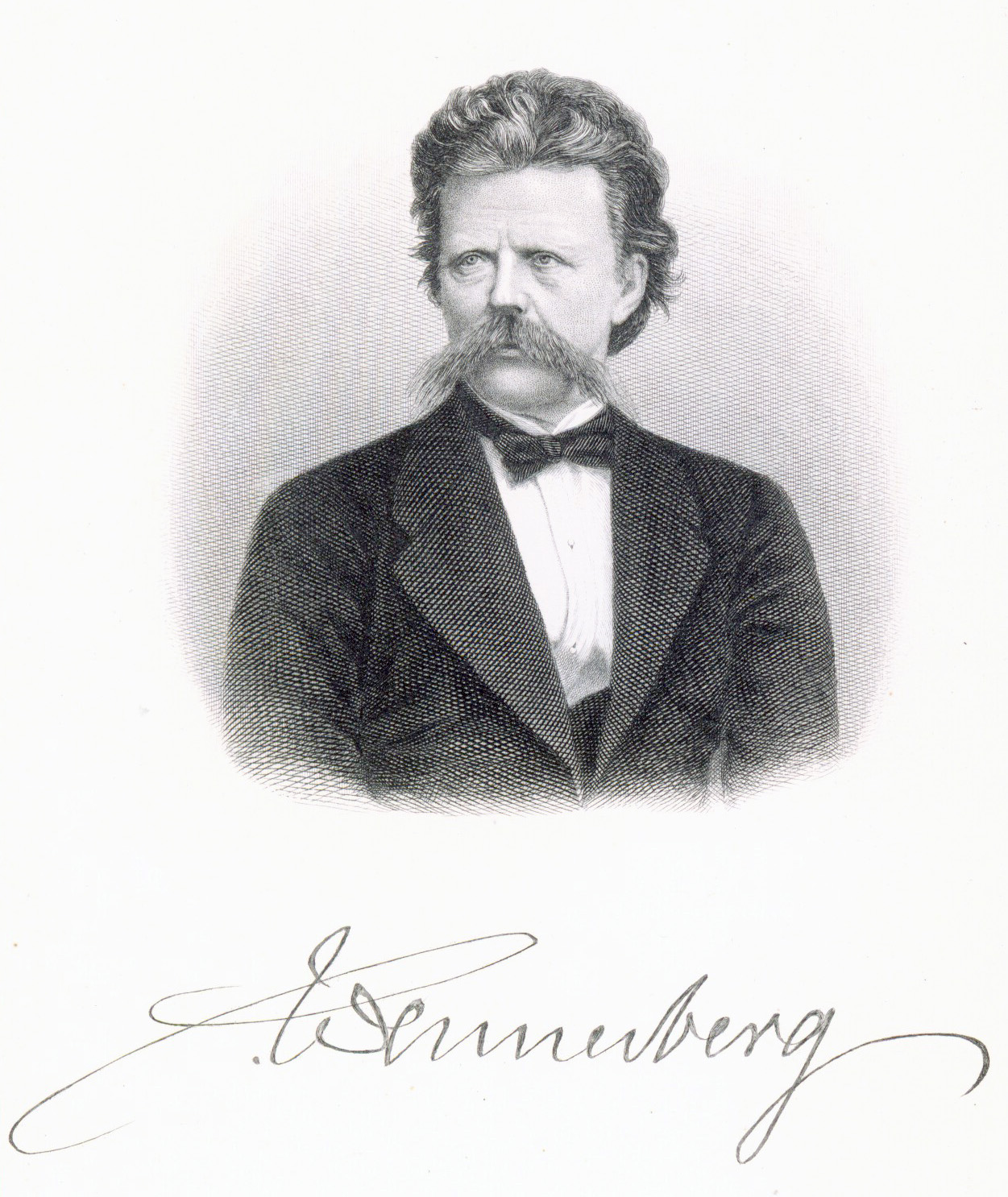 Gunnar Wennerberg (1817-1901)